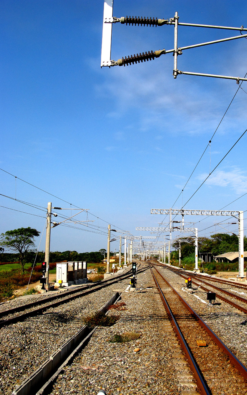 臺灣鐵路管理局富岡基地北湖口進廠線，攝於北湖車站。